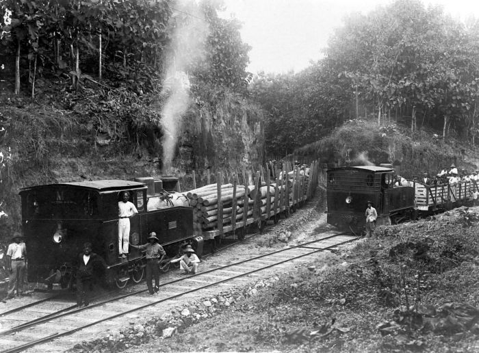 Repronegatief. In de tweede helft van de 19e eeuw werden er op de meeste bosexploitatieterreinen rails aangelegd, waarover wagens met hout getrokken werden. Aanvankelijk gebeurde dat door trekdieren, later door stoomlocs. Men vervoerde de stammen en balken lang niet altijd meer naar een rivier, maar naar een terrein naast de normale spoorlijn. Het hout kon zo verder over het hoofdnet van de spoorwegen vervoerd worden naar de hoofdstapelplaatsen of naar de afnemers. (P. Boomgaard, 2001). Twee treinen bij een wissel voor het vervoer van djati, Houtvesterij Tjepoe, Midden Java